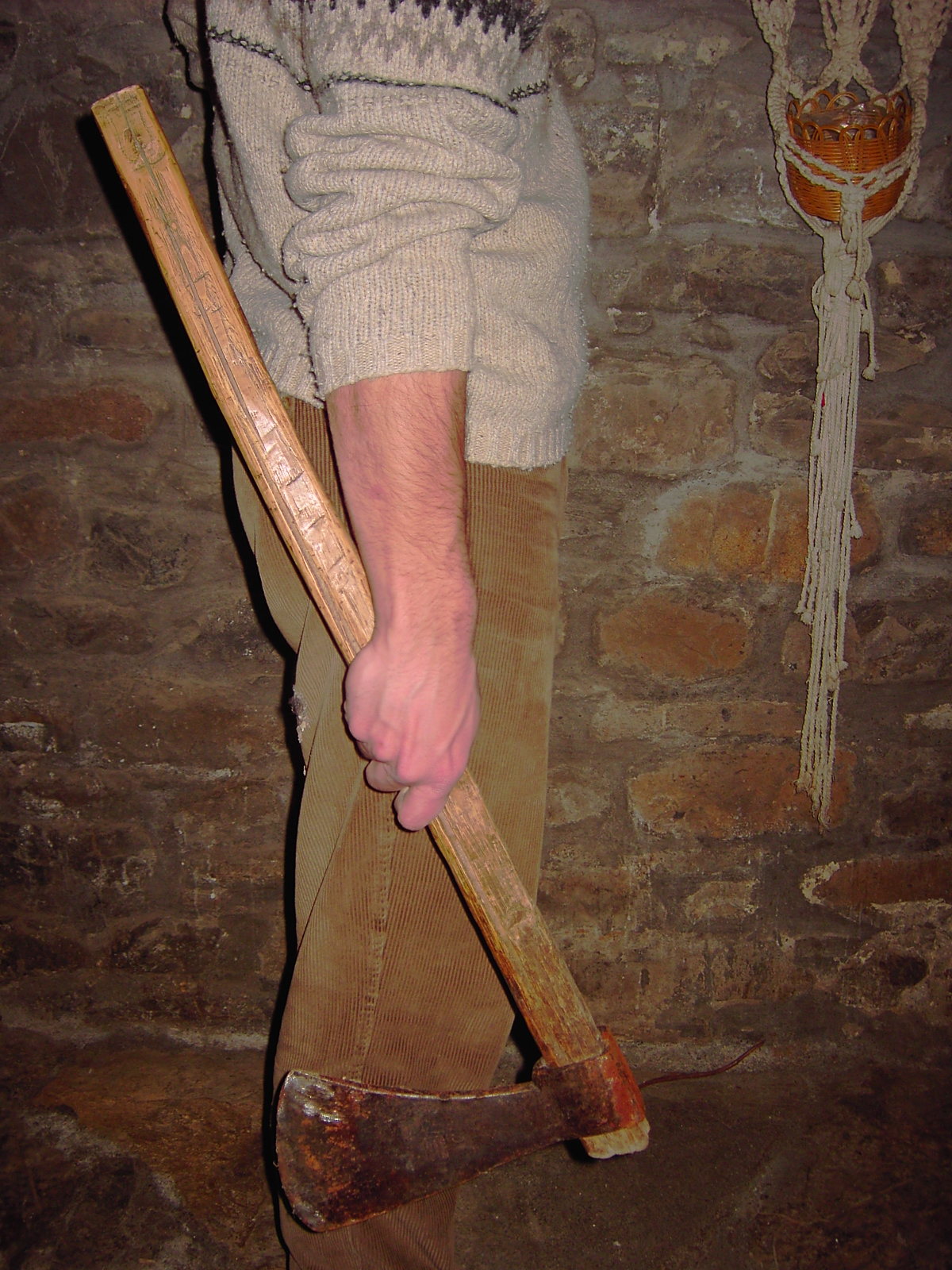 Hacha altaragonesa o Estral.